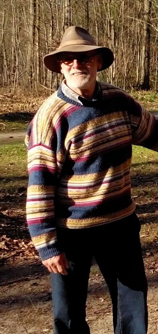 Foto van Ad Wouters gemaakt toen we hem ontmoetten bij zijn beeld van de Neanderthaler in het Heverleebos